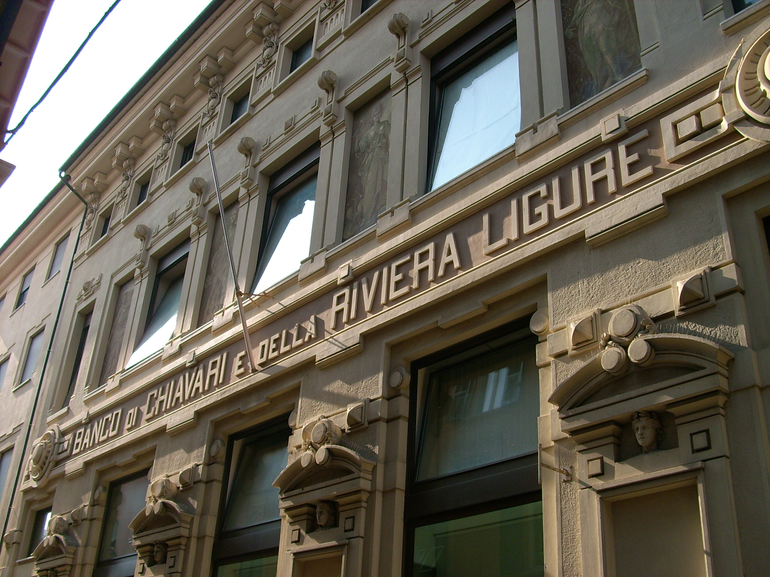 Sede del Banco di Chiavari e della Riviera Ligure di Chiavari, Liguria, Italia